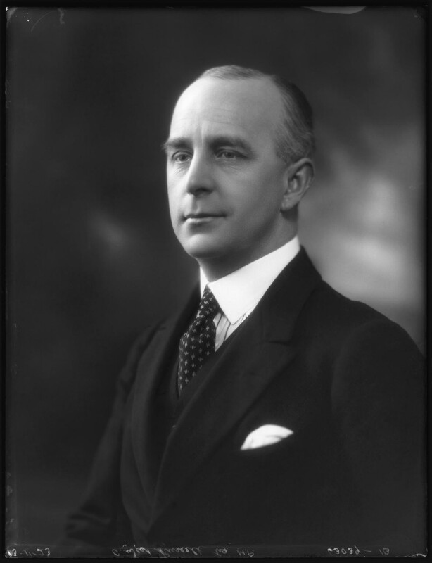 Sir Alexander West Russell